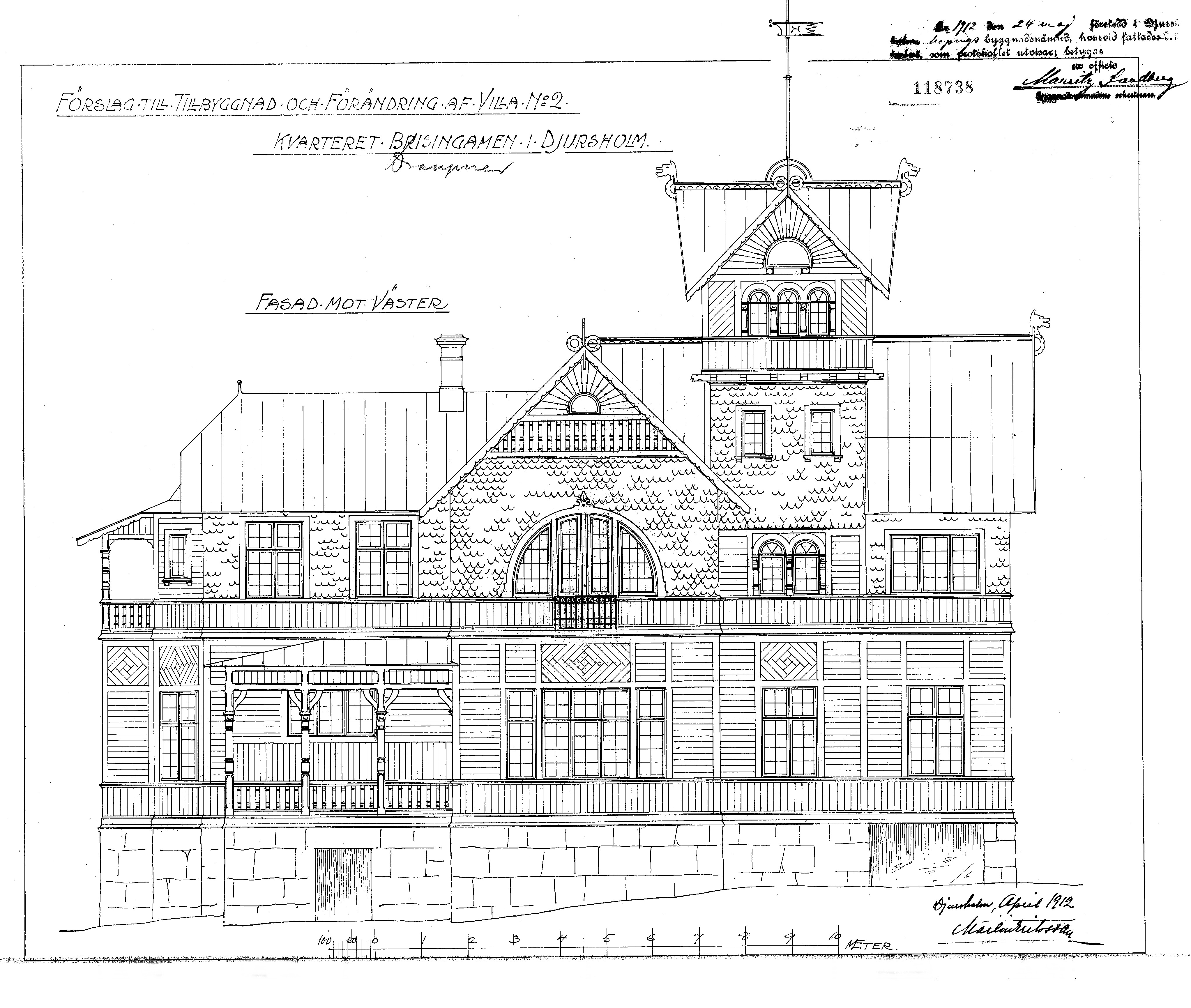 Villa Ugglebo, fasad mot väst